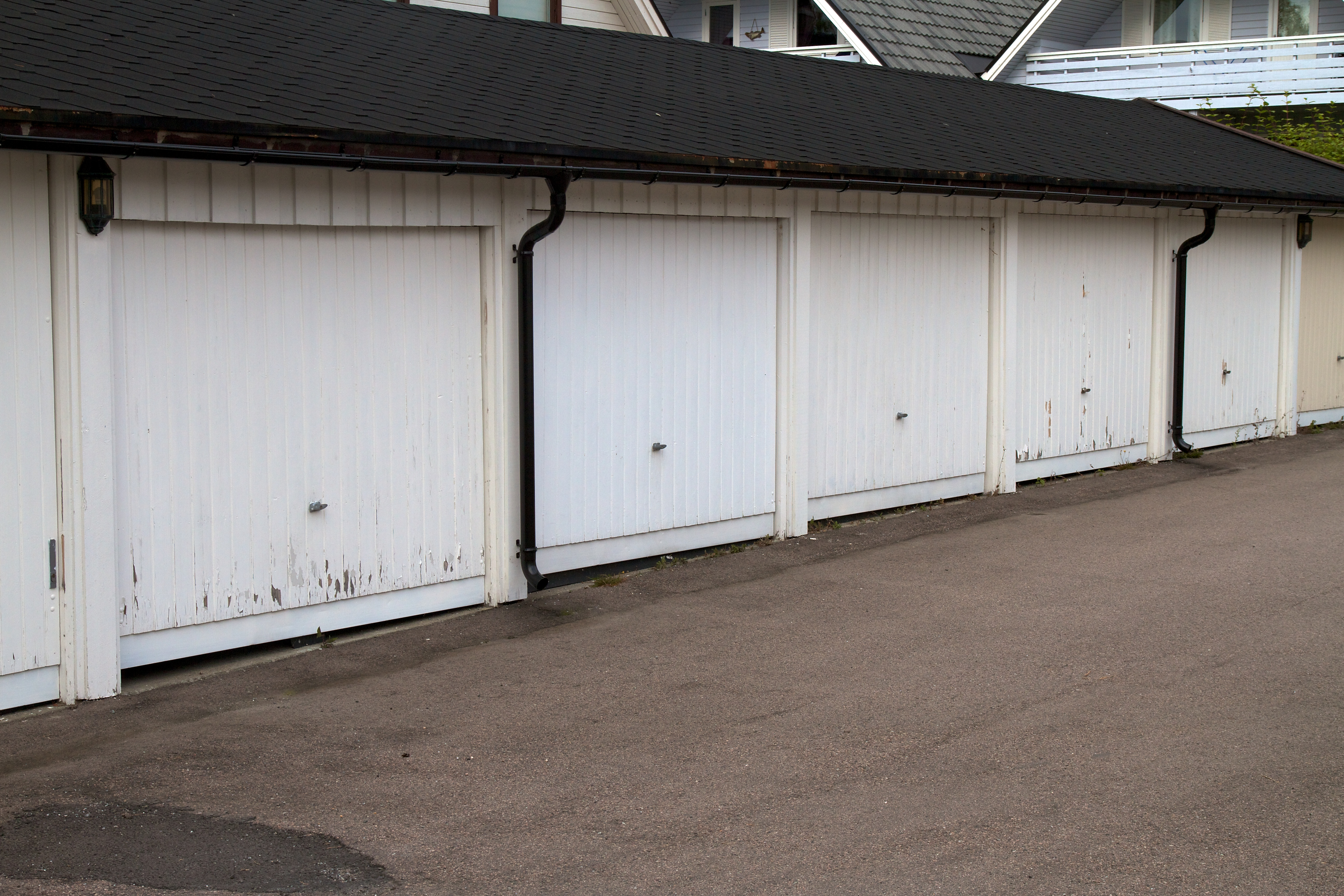 Garasjer i et bilogfelt på Prinsdal i Oslo.